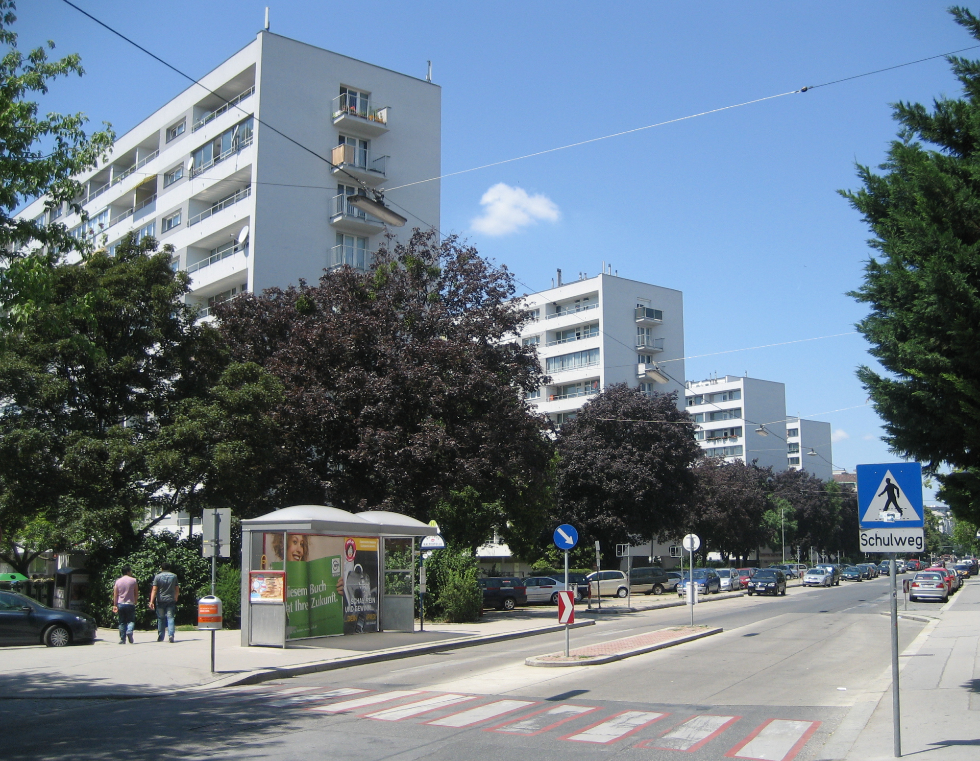 Das Haus Vorgartenstraße 158 in der Leopoldstadt, in Wien This media shows the Vienna residential building (Gemeindebau) with the ID 388.